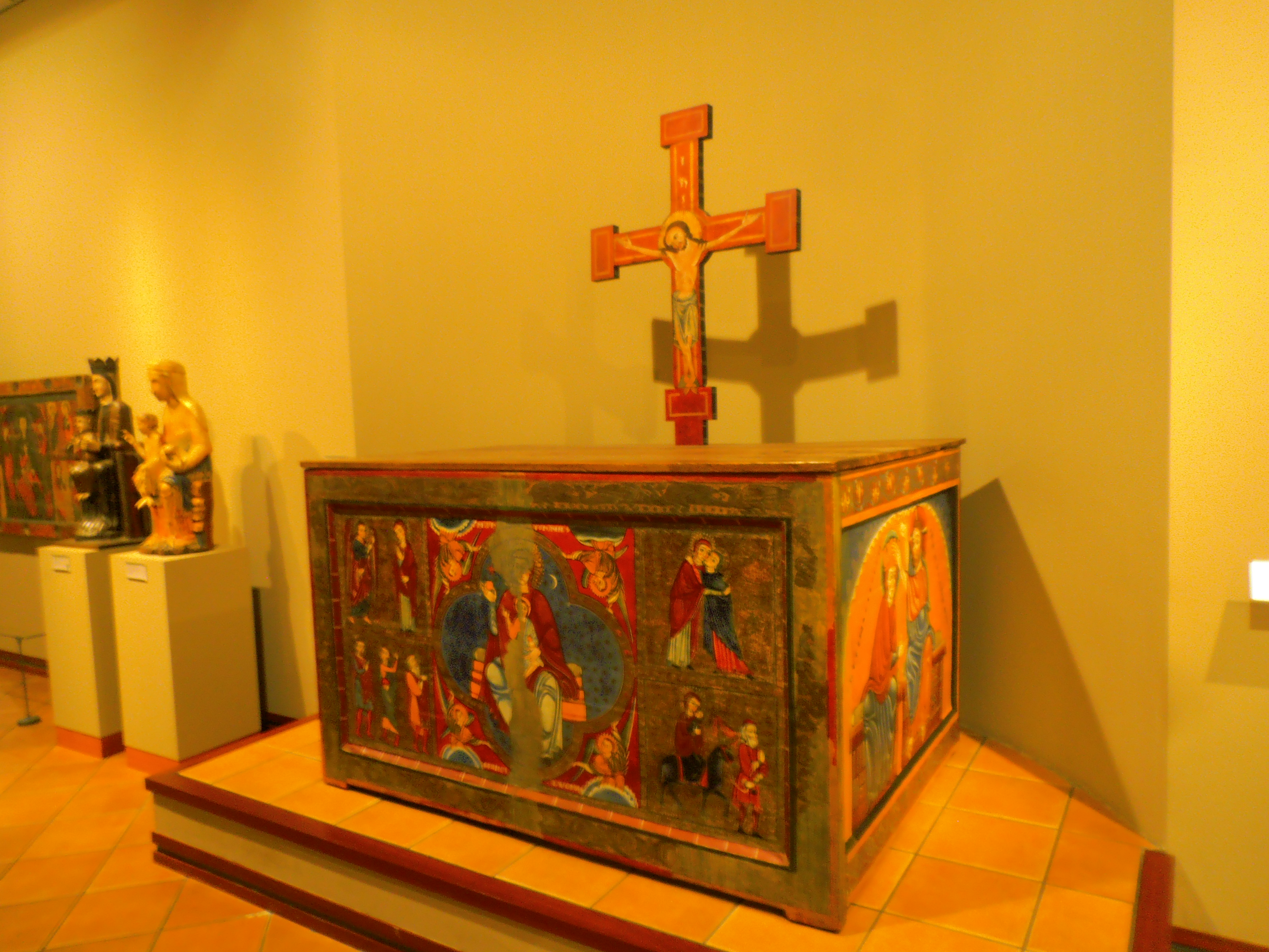 Autentic altar del Monestir de santa Maria de Lluçà. Es pot observar a la part central que hi manca pintura. Es perquè aquest va ser partit per la meitat i en tornar-lo afegir va restar malmesa aquesta part.